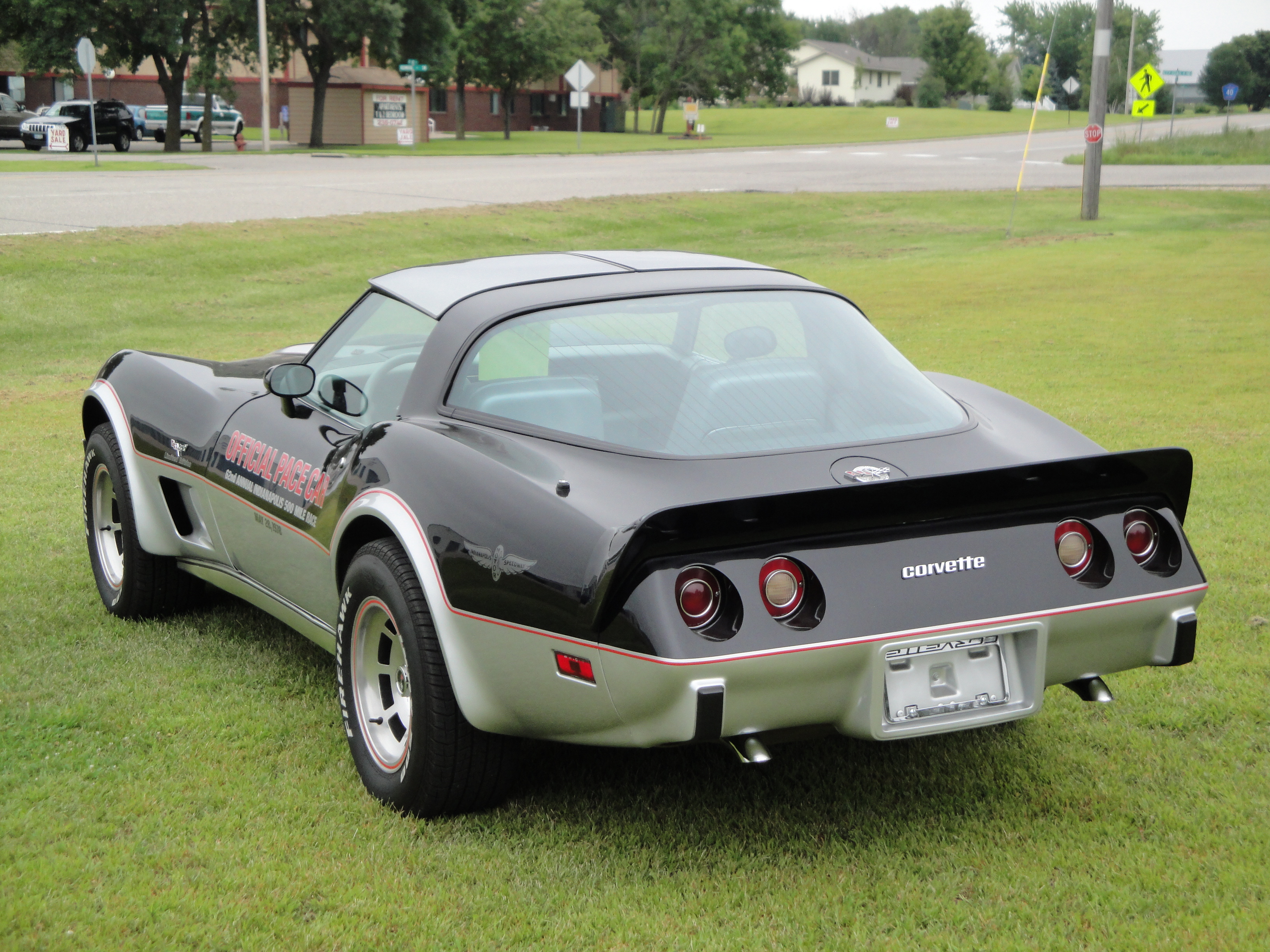 78 Chevrolet Corvette Pace Car